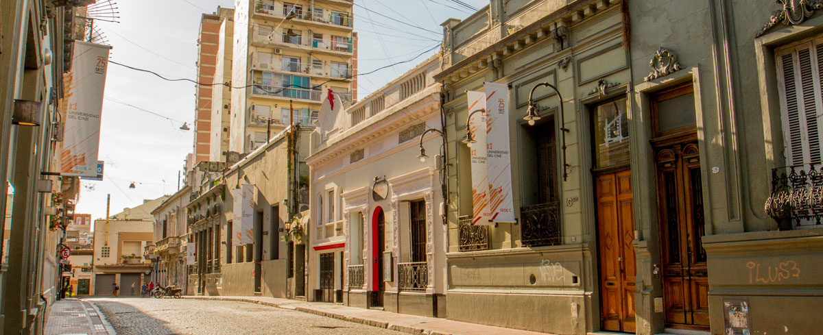 La calle Pasaje Giuffra del barrio porteño de San Telmo. Puede verse la Universidad del Cine.